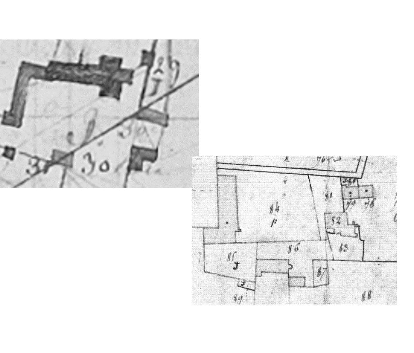 comparaison de deux plans géométriques